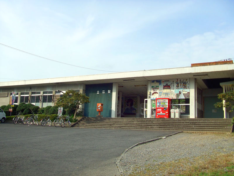 撮影者：はづき裕一（2008年10月25日撮影） ※ 写真写りの良いものに差し替え